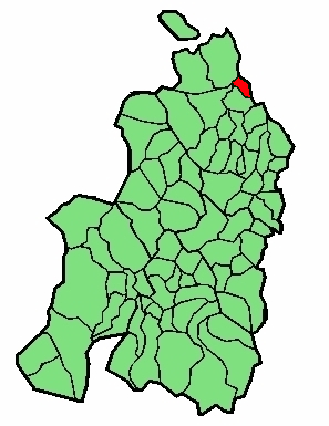 aipaturiko udalerriaren kokapena Nafarroa Beherean